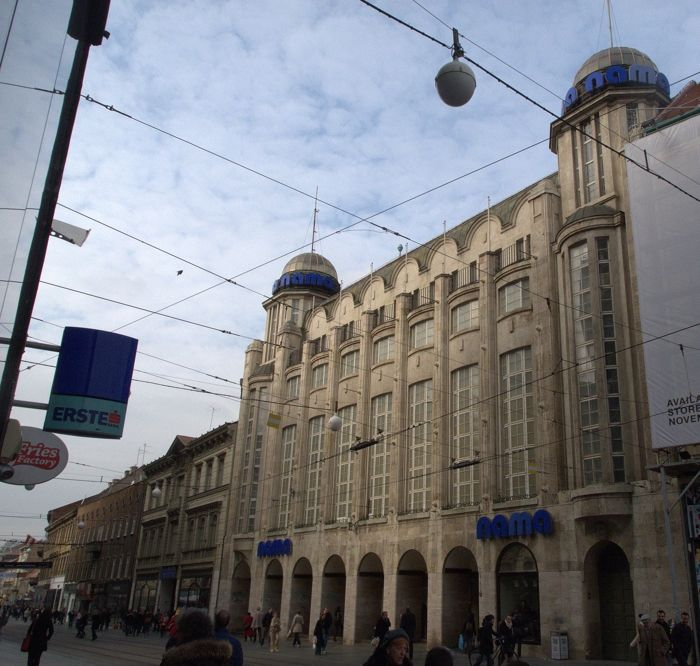 Robna kuća NAMA u Zagrebu